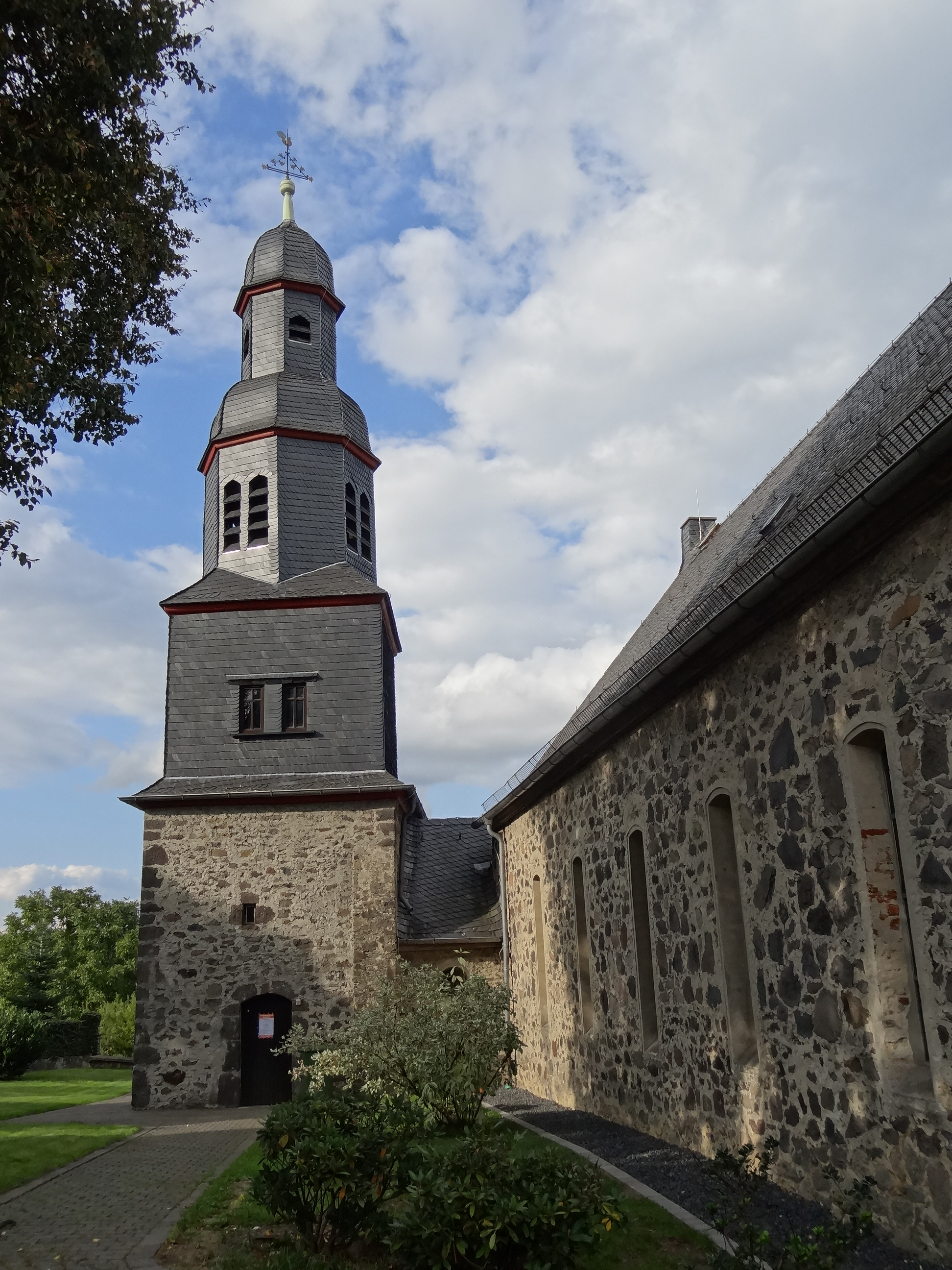 Evangelische Kirche (Hattenrod)Evangelische Kirche (Hattenrod)